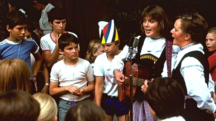 Machlandduo beim 4. Perger Kinderfest